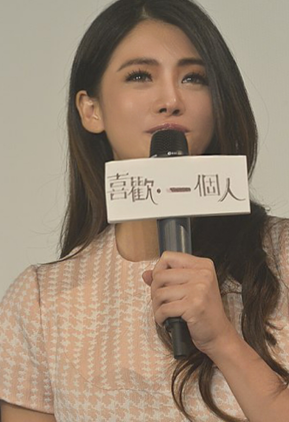 喜歡．一個人《最終回》粉絲見面會